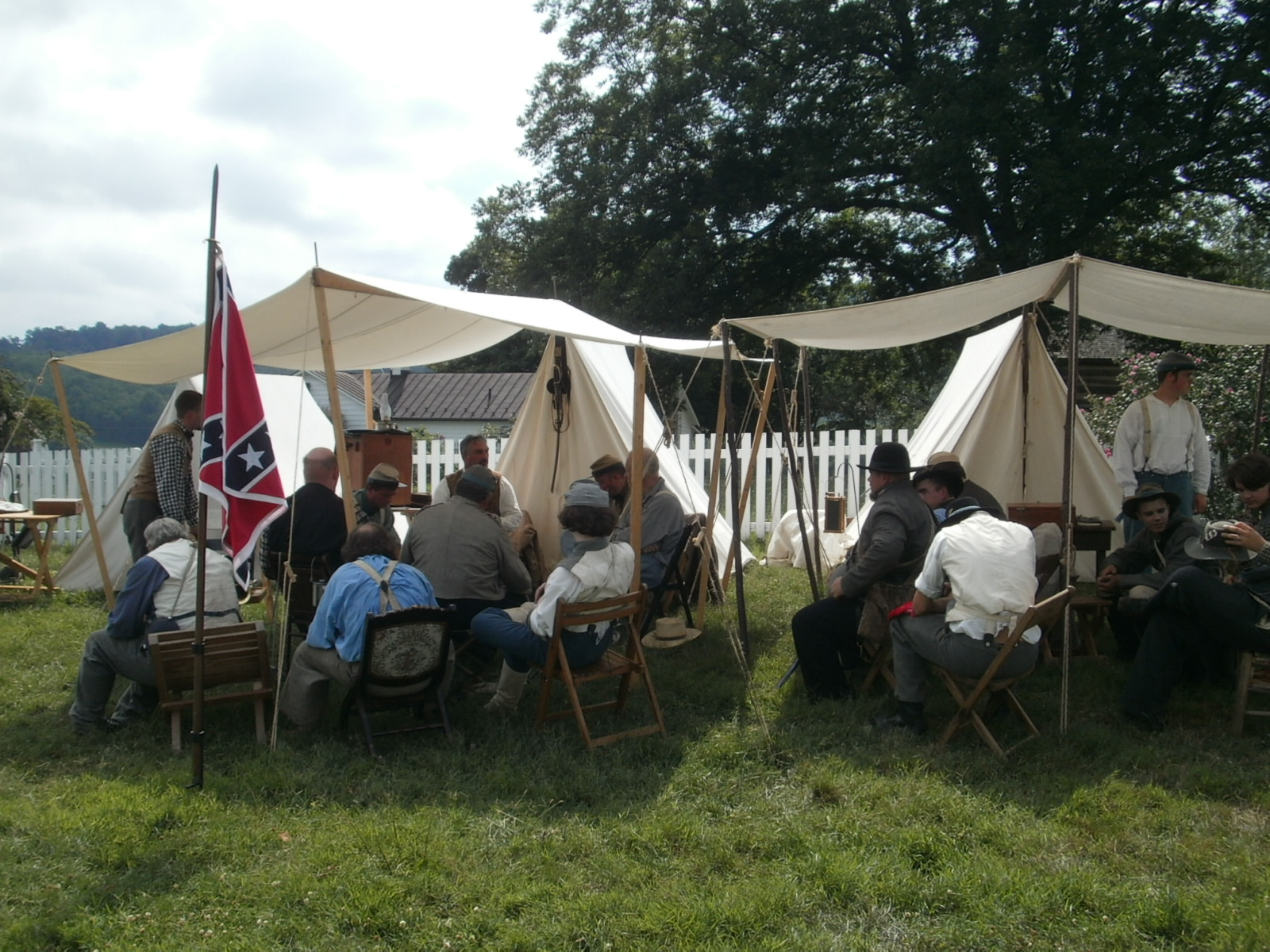 3rd Regiment